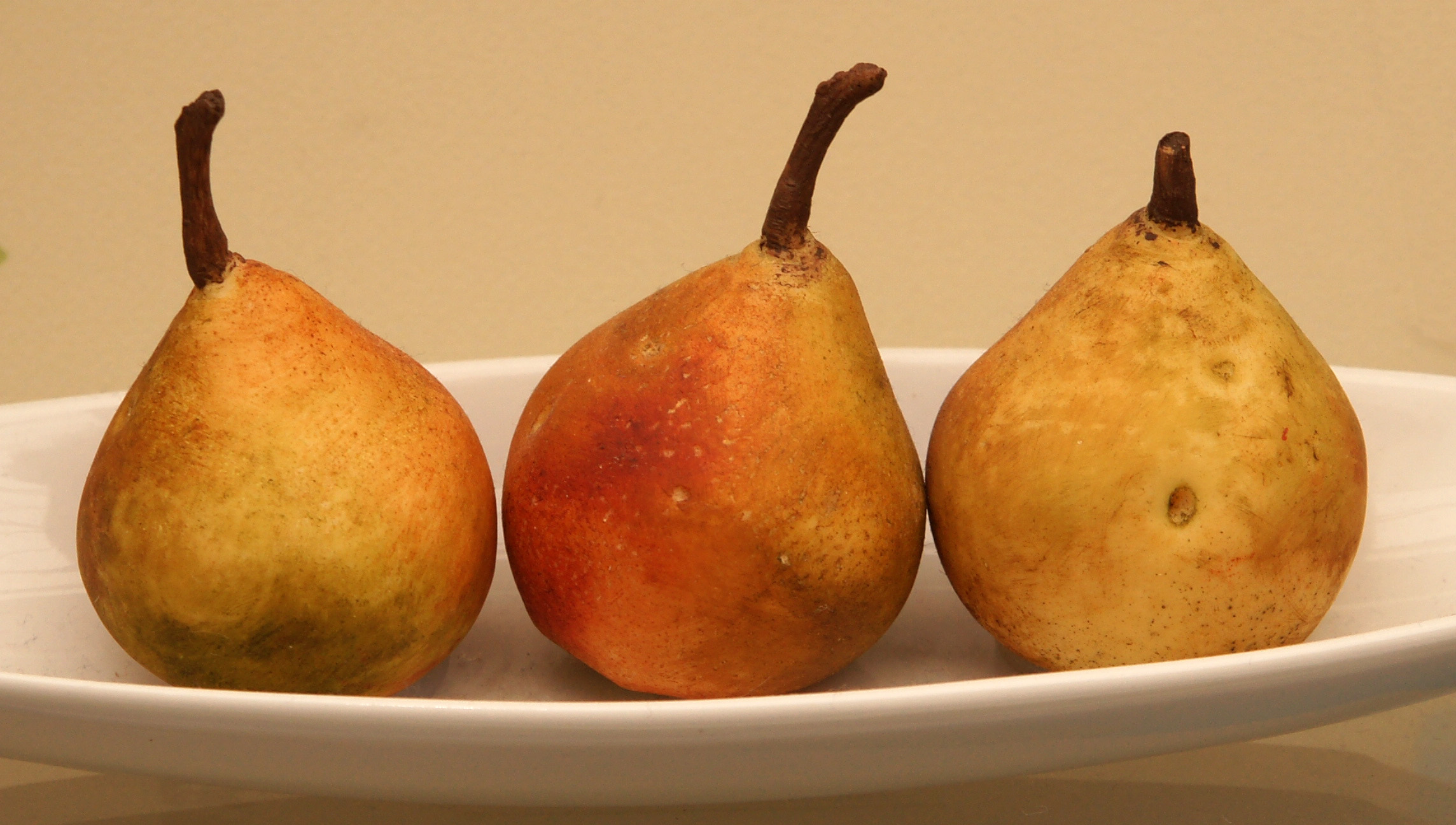 Büschelibire (Nachbildung, BEA Bern expo 2011)